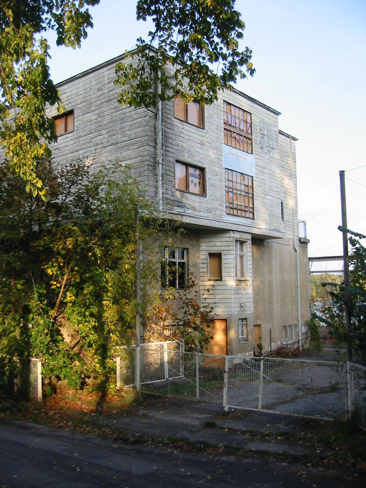 Villa Louis Edmund Hagen in Potsdam, 2005